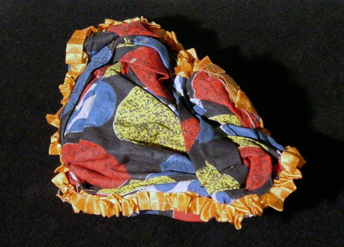 Model. Model van een Surinaamse hoofddoek, gevouwen als "Pruiser hiddi", op Pruisische wijze. Angisa's vormen onderdeel van de dracht van een kotomisi. De koto is een in Suriname ontstane klederdracht die werd bedacht door slavenhouders en hun vrouwen om hun slavinnen 'zedig' te kleden. De dracht bestaat uit een koto (rok), jaki (jak) en angisa (hoofddoek). Aan de dracht kon men aflezen tot welke godsdienst de slavenhouder behoorde. Hoewel vroeger dagelijkse kleding, veranderde de koto later in gelegenheidskleding. De koto en vooral de angisa spraken en spreken een geheime taal (Henar-Hewitt, 1987:35). . Model van een Surinaams-Creoolse hoofddoek Unknown language: Angisa